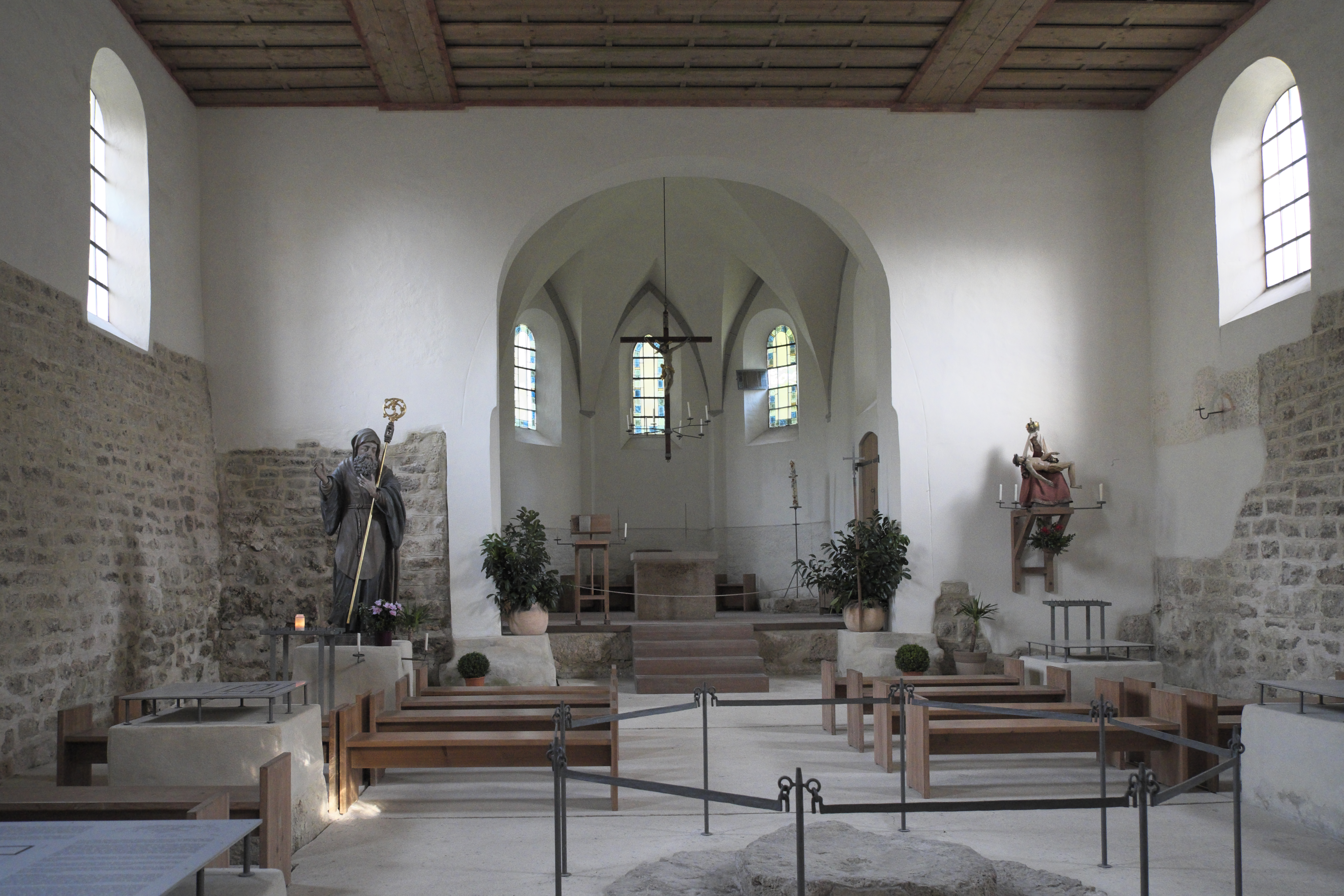 Katholische Filialkirche St. Benedikt in Sandau (Landsberg am Lech) im Landkreis Landsberg am Lech (Bayern/Deutschland), Innenraum